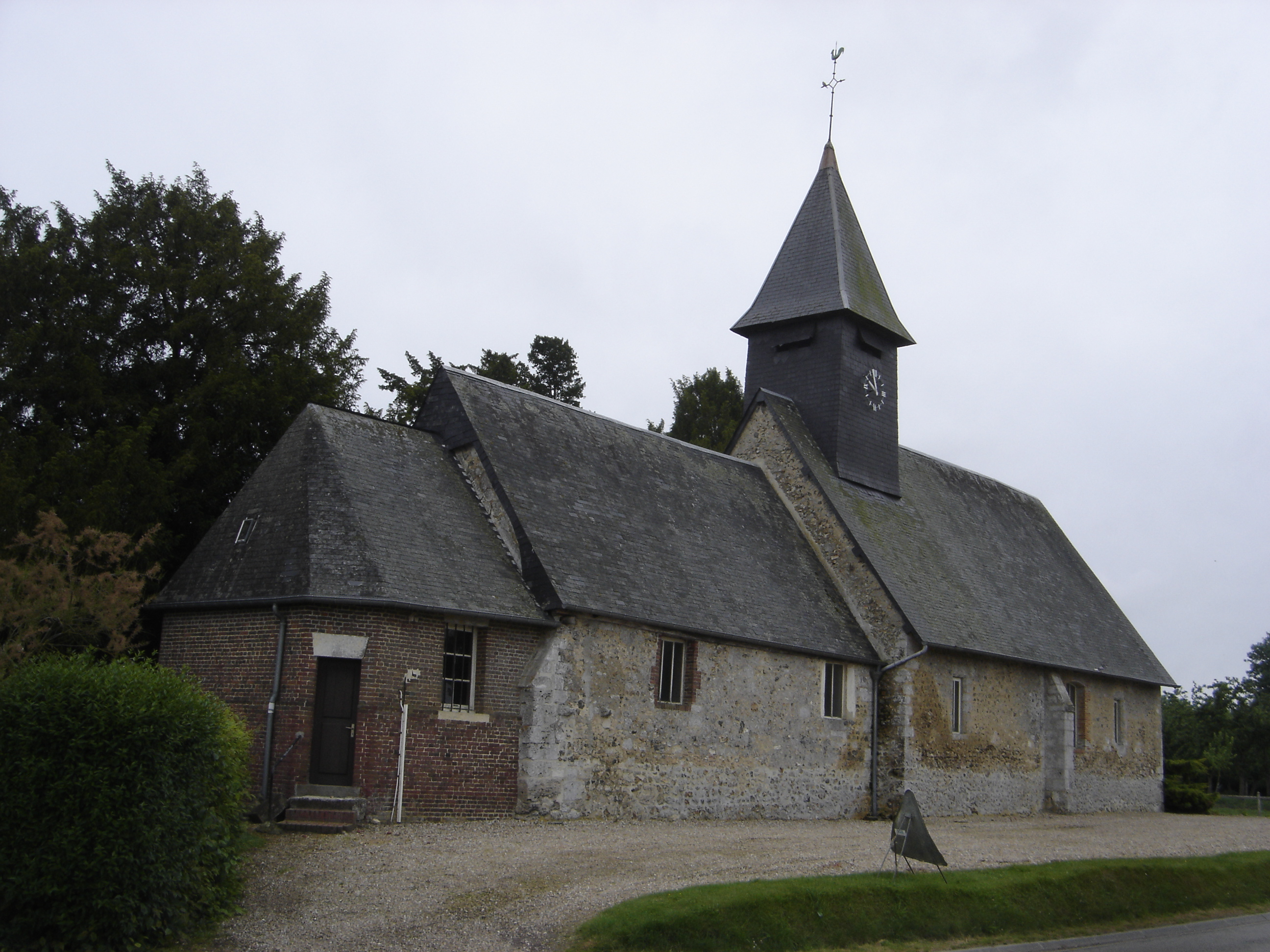 église du Bois-Hellain - Eure - France